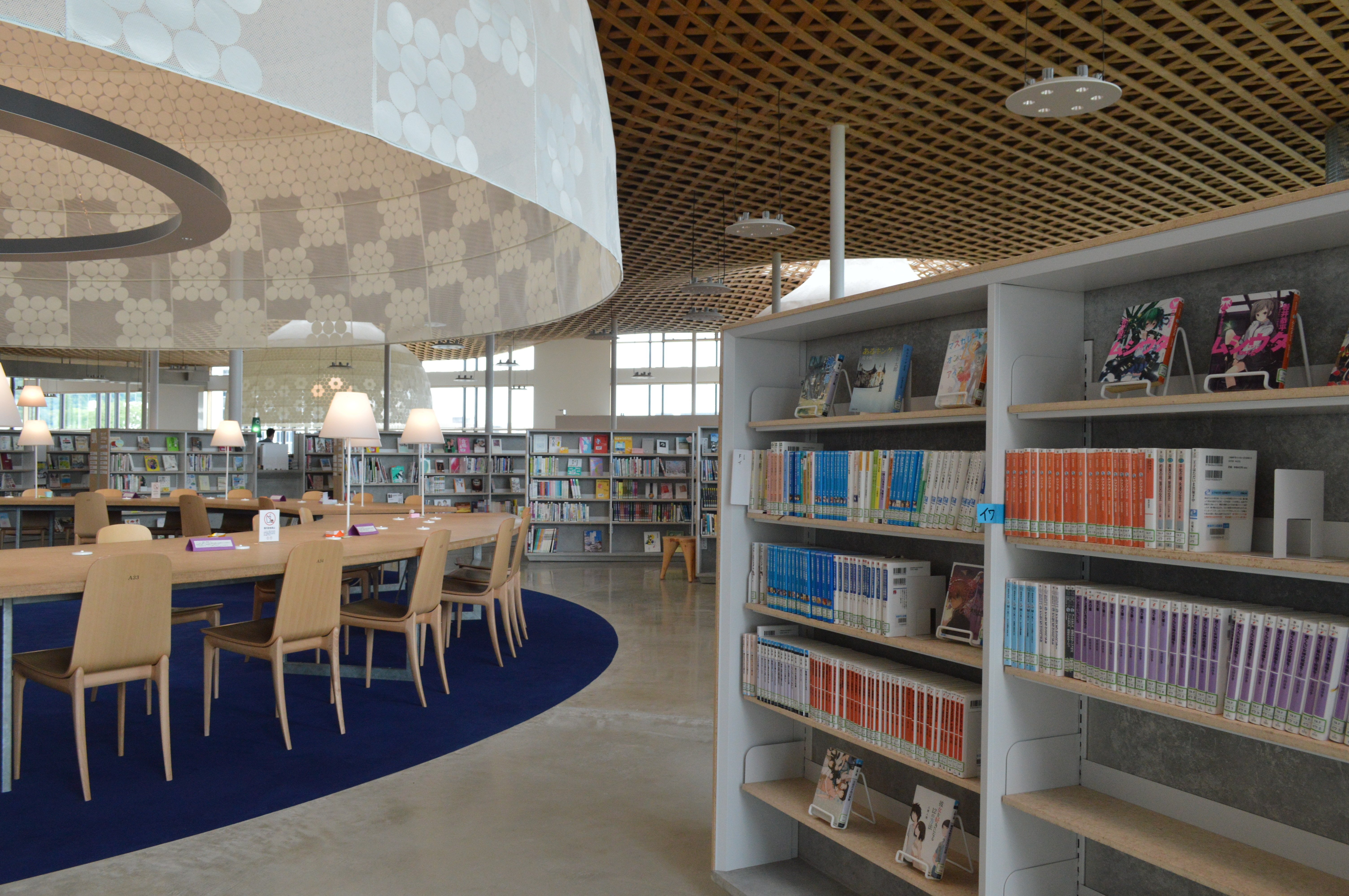 岐阜県岐阜市にあるみんなの森 ぎふメディアコスモス2階の岐阜市立中央図書館。